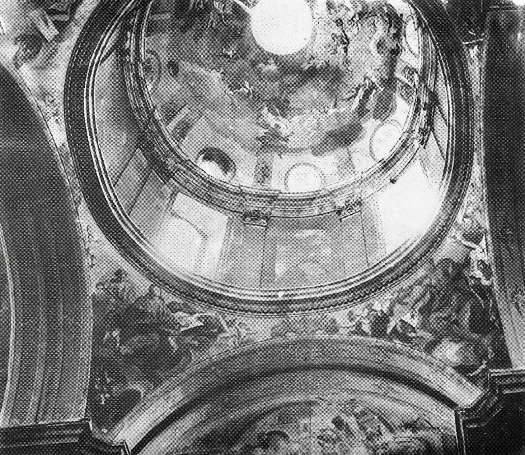 Jan de Witte (1709–1785): Kirche des Klosters der Unbeschuhten Karmeliten in Berdytschiw (polnisch Berdiczów), Wolhynien, Ukraine (1737–1754). Innenansicht der Kuppel.